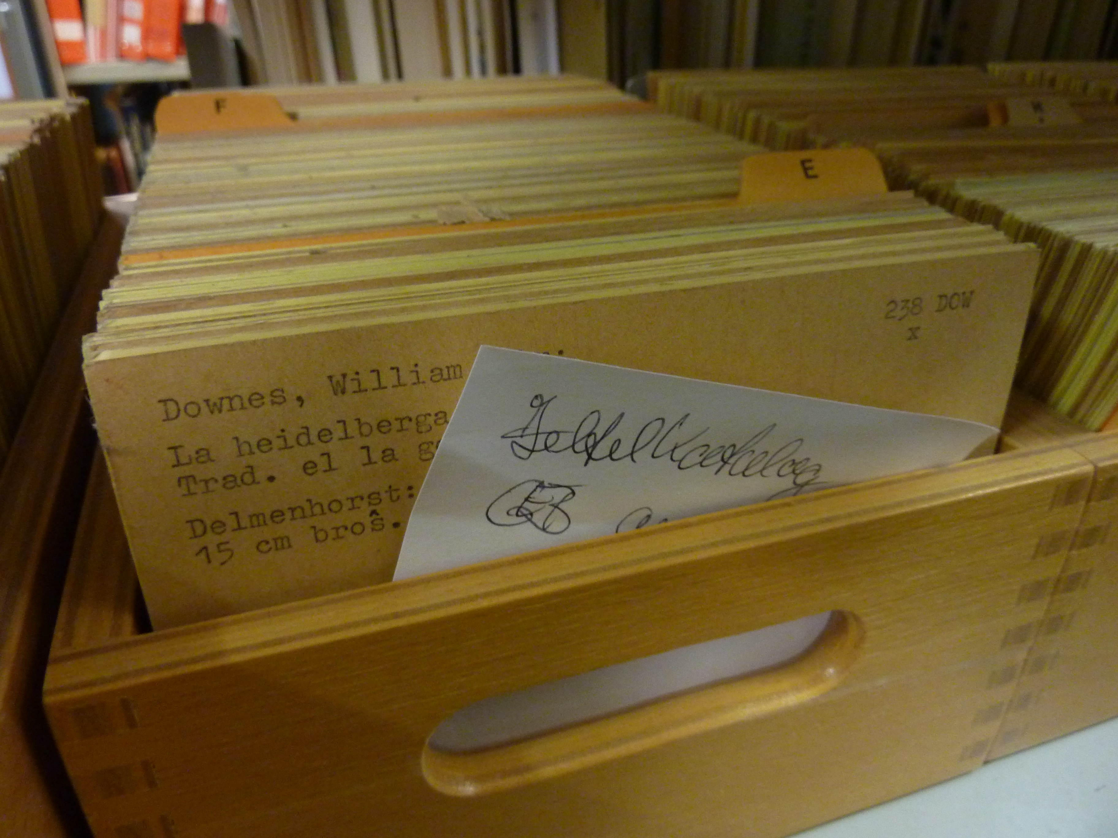 Parto de la malnova slipo-katalogo de la Germana Esperanto-Biblioteko en Aalen.